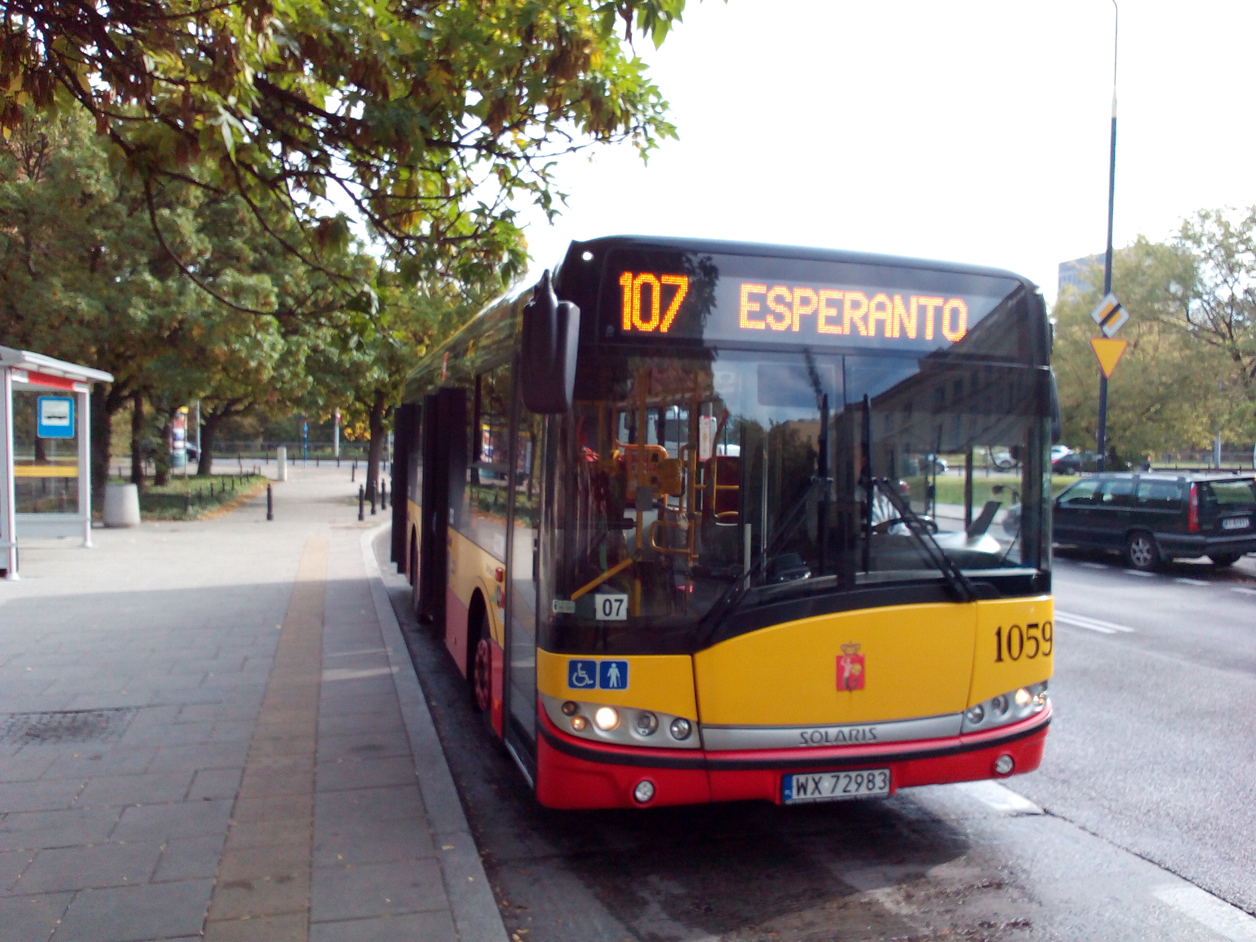 Haltiĝinta aŭtobuso de la linio 107 veturanta al la fina stacio Esperanto en Varsovio The code number of this Zamenhof/Esperanto object is pl-050. Wikidata has entry Q57081546 with data related to this item.